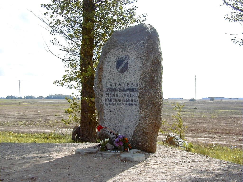 Džūkstes apkārtne, piemineklis leģionāriem 2000-09-02